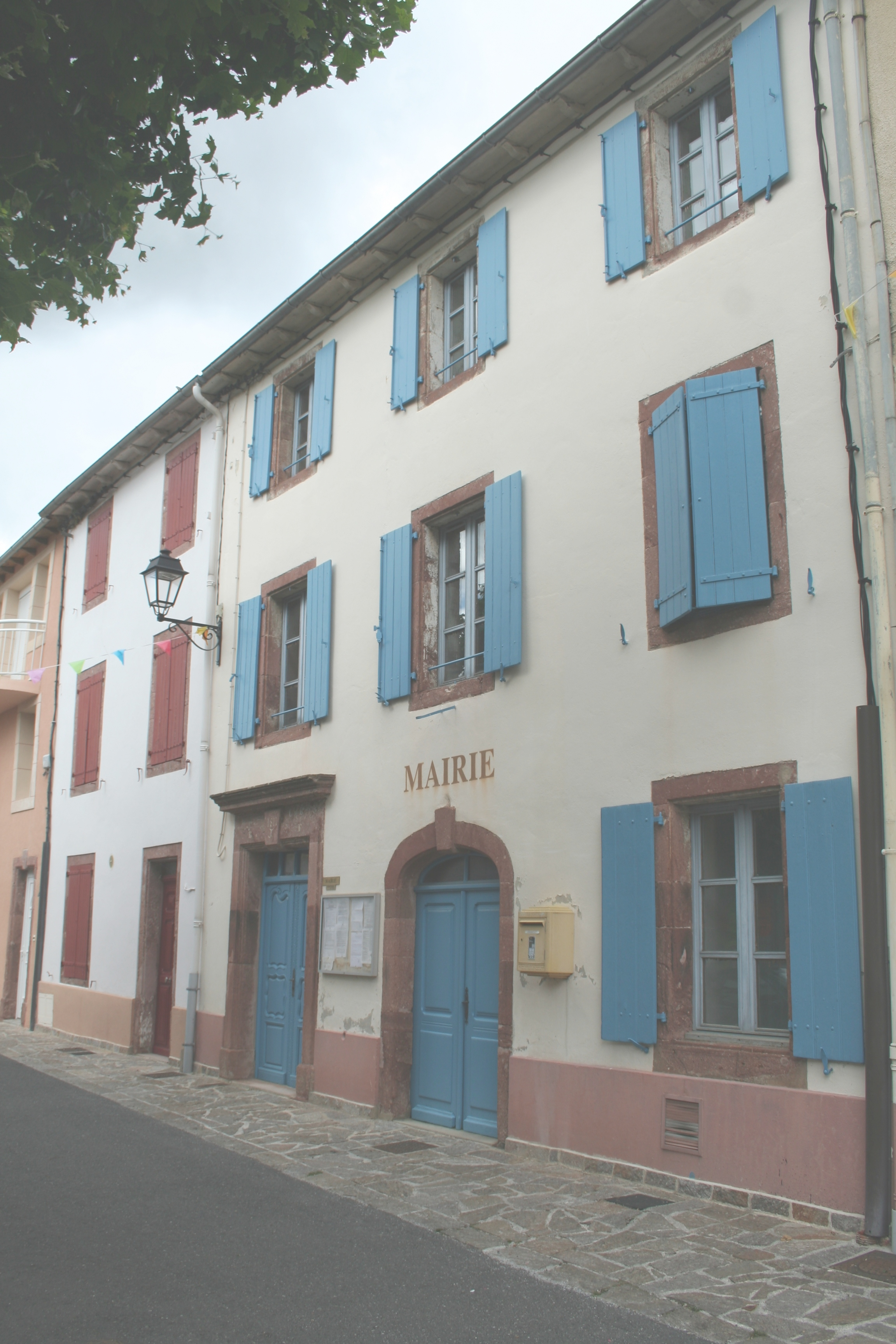 Murasson (Tarn) - mairie.